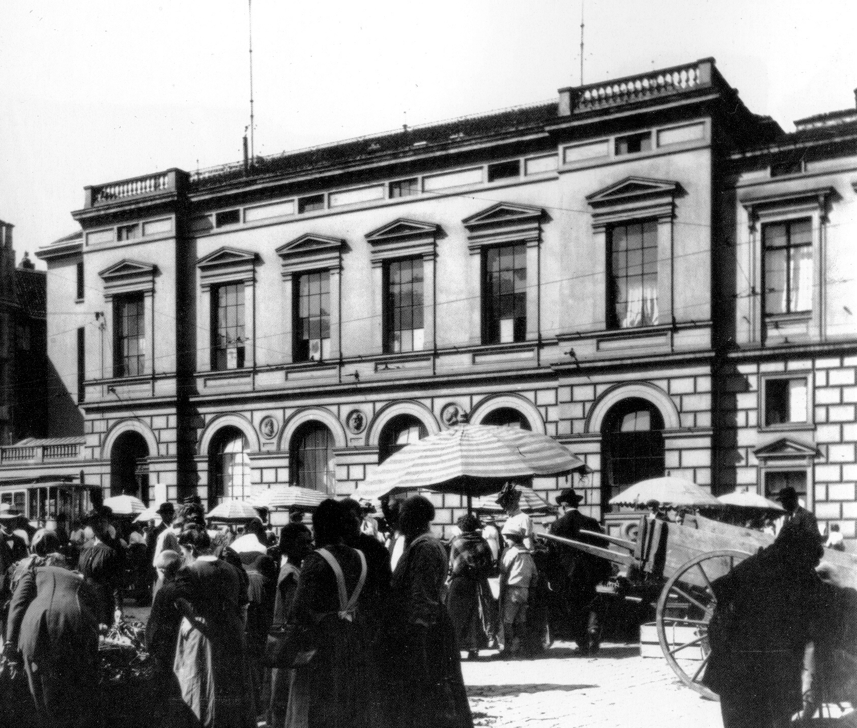 Düsseldorf, Burgplatz, Gebäude der Königlichen Landesbibliothek (vormals Gemäldegalerie: Mit Fertigstellung der Kunstakademie an der Eiskellerstraße war Ende November 1879 zuerst das Historische Museum in das Galeriegebäude des Schlosses eingezogen.)